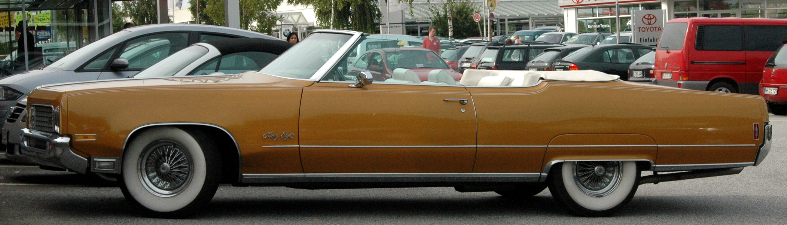 Oldsmobile 98 Convertible 1970